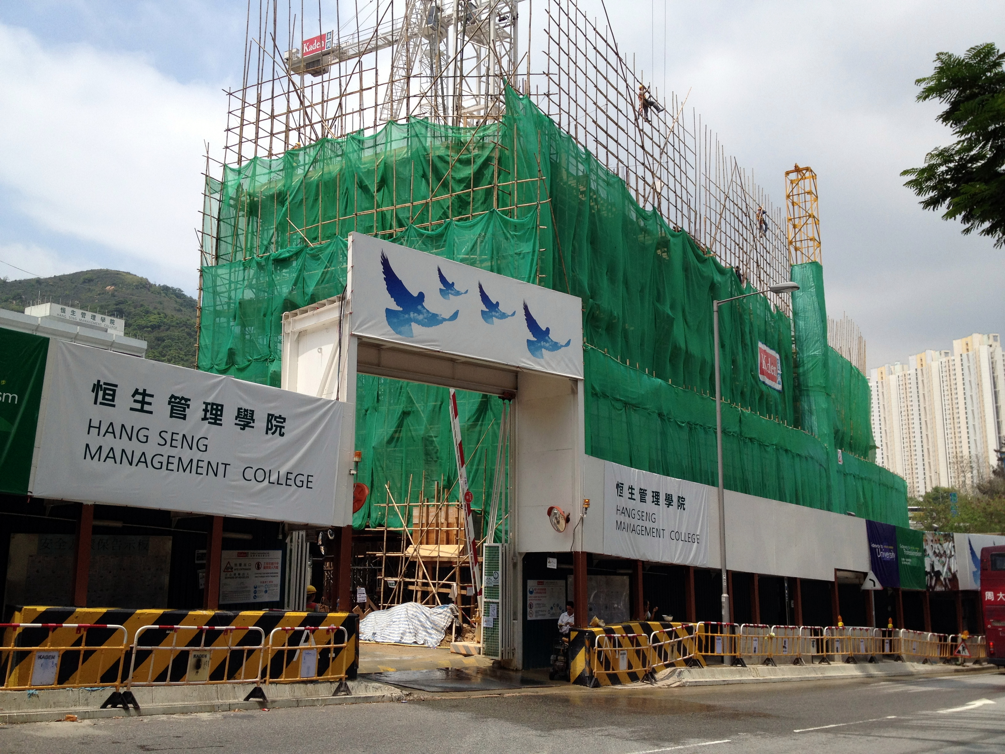 Hang Seng Management College